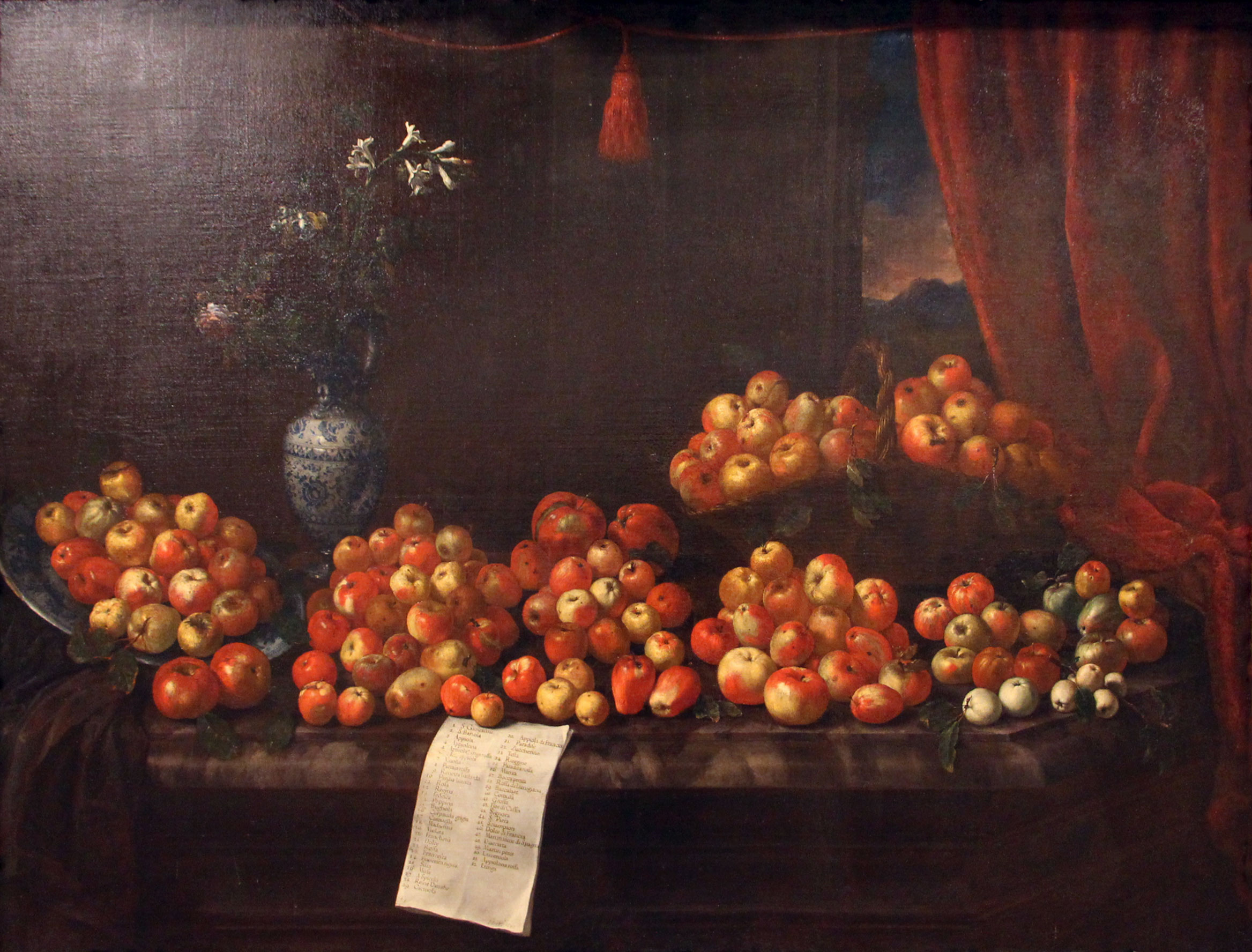 Villa medicea di Poggio a Caiano - MIBAC The making of this document was supported by Wikimedia CH. (Submit your project!) For all the files concerned, please see the category Supported by Wikimedia CH. This is a photo of a monument which is part of cultural heritage of Italy.